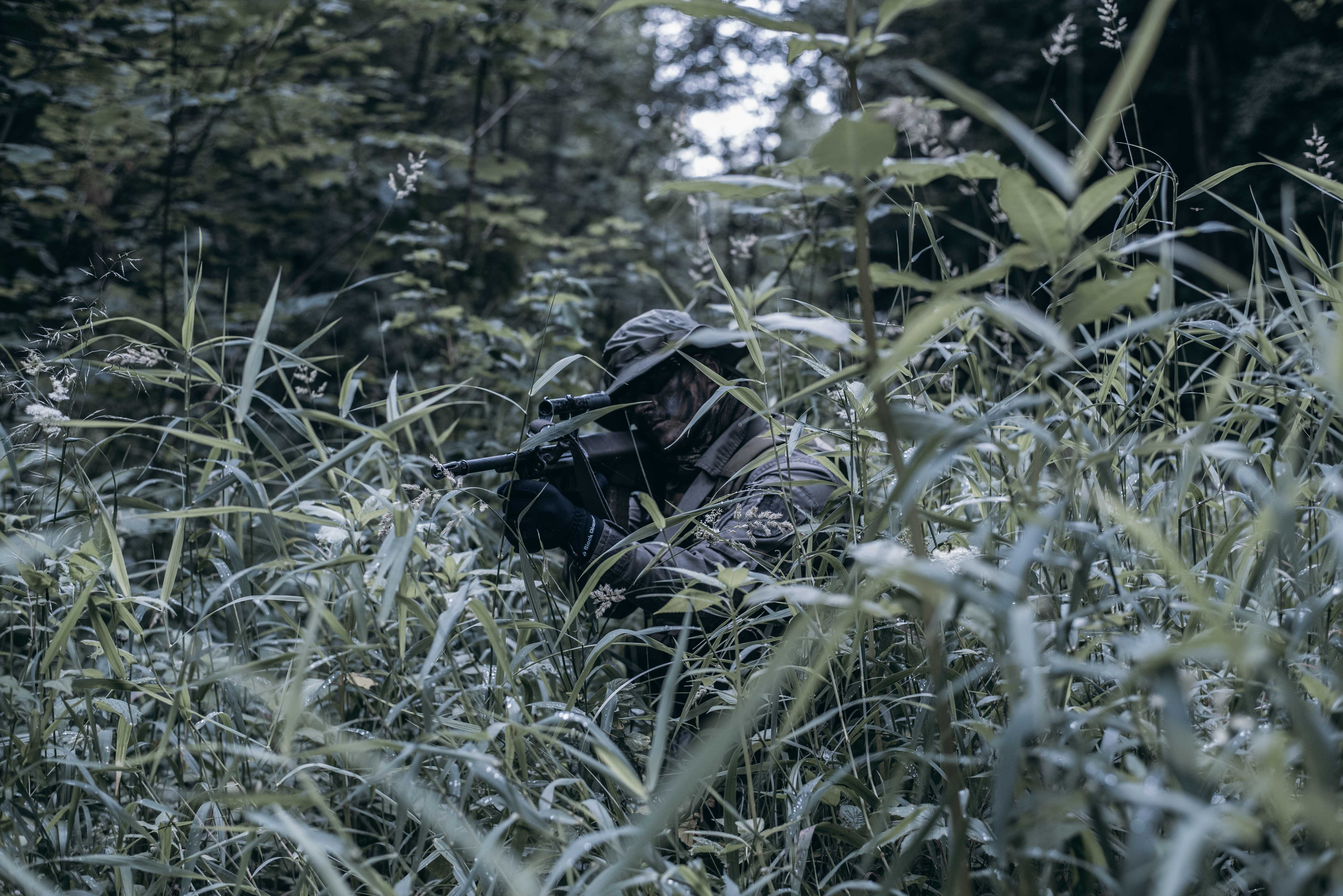 Ein Soldat der Panzerpionierkompanie des Pionierbataillons 2 während der Ausbildung auf dem Truppenübungsplatz Salachau.